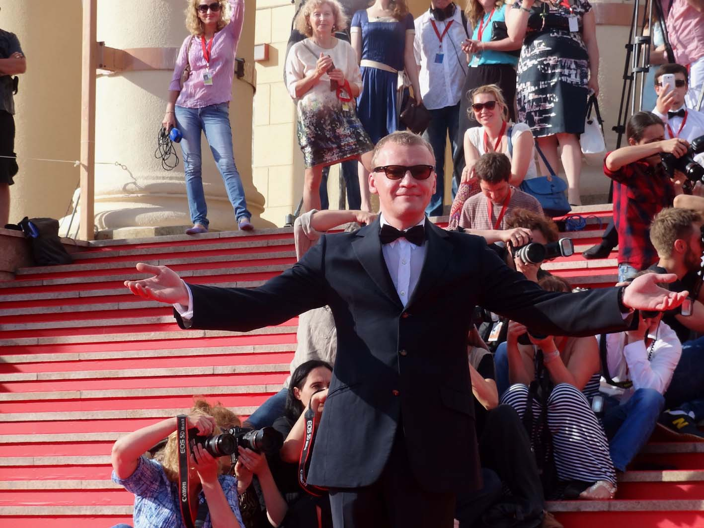 Алексей Валерьевич Серебряко́в (род. 3 июня 1964, Москва) — советский и российский актёр театра и кино, заслуженный артист Российской Федерации (1998), народный артист Российской Федерации (2010). На церемонии закрытия открытого российского кинофестиваля «Кинотавр» в 2014 году в Сочи.